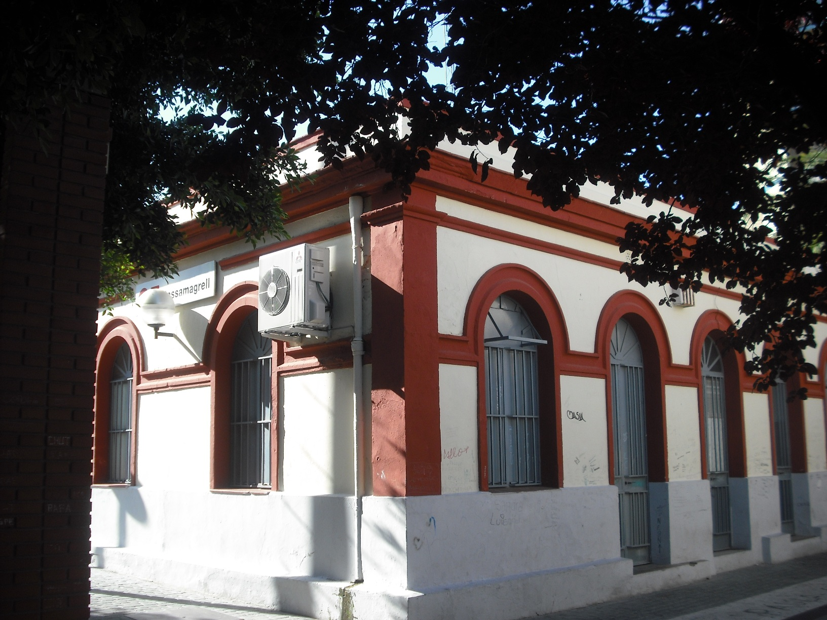 Estació de metro.